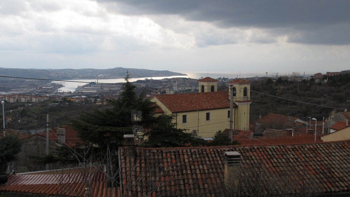 In primo piano la chiesa di San Giuseppe della Chiusa, sullo sfondo la baia di Muggia.